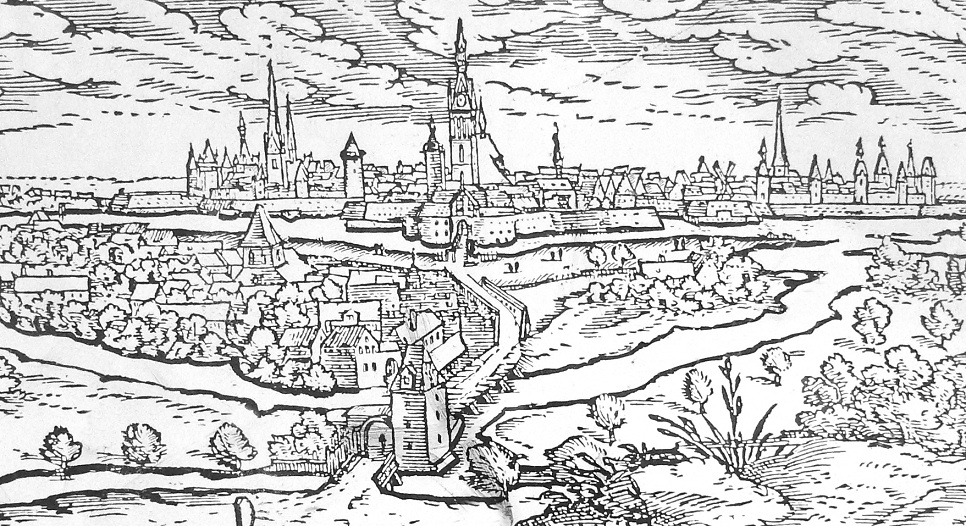 Hannover 1636